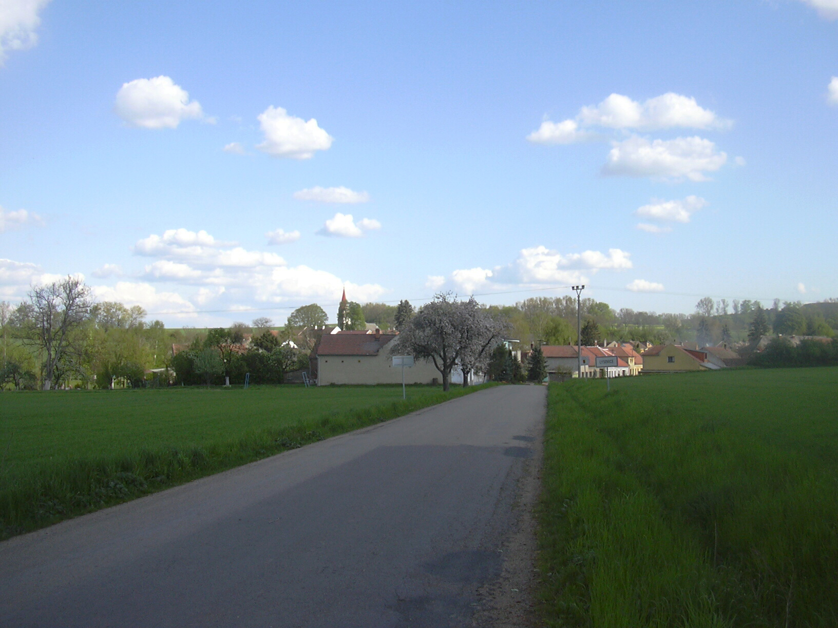 Pohled na Lysovice (Vyškov District - Czech Republic)